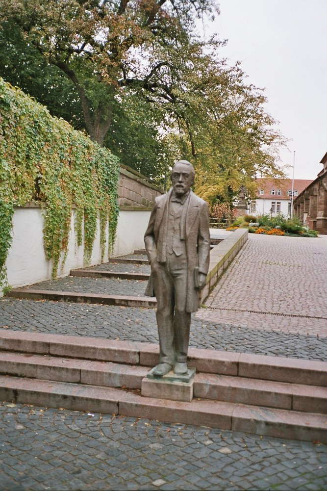 Bronzestatue von Theodor Storm vom Bildhauer Werner Löwe (Website: leomil.de) in Heiligenstadt